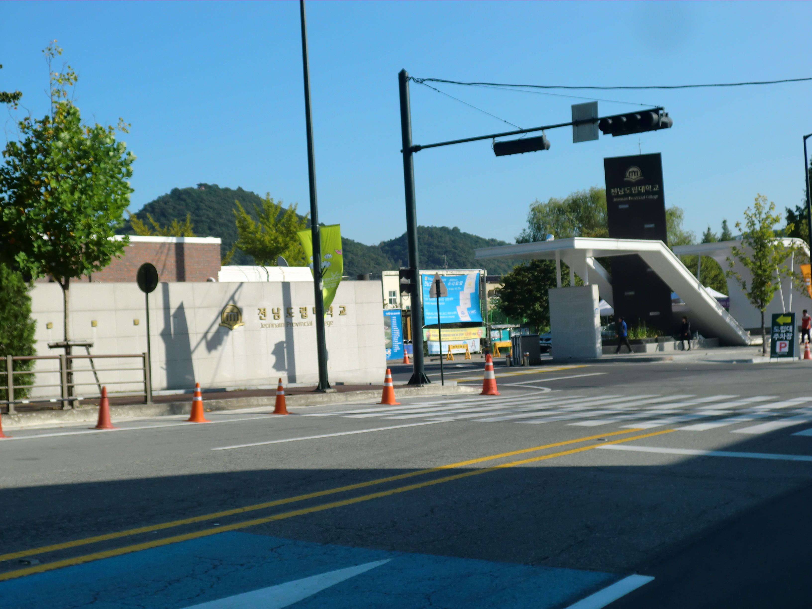 전라남도 담양군에 있는 전남도립대학 정문